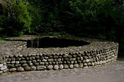 Arbon: Konservierte Fundamente von Turm 6 des spätrömischen Kastells